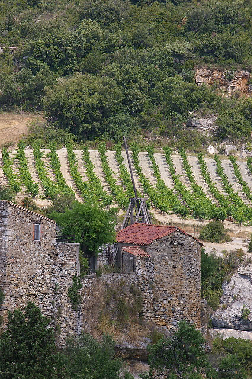 Vignoble sur coteaux à Minerve